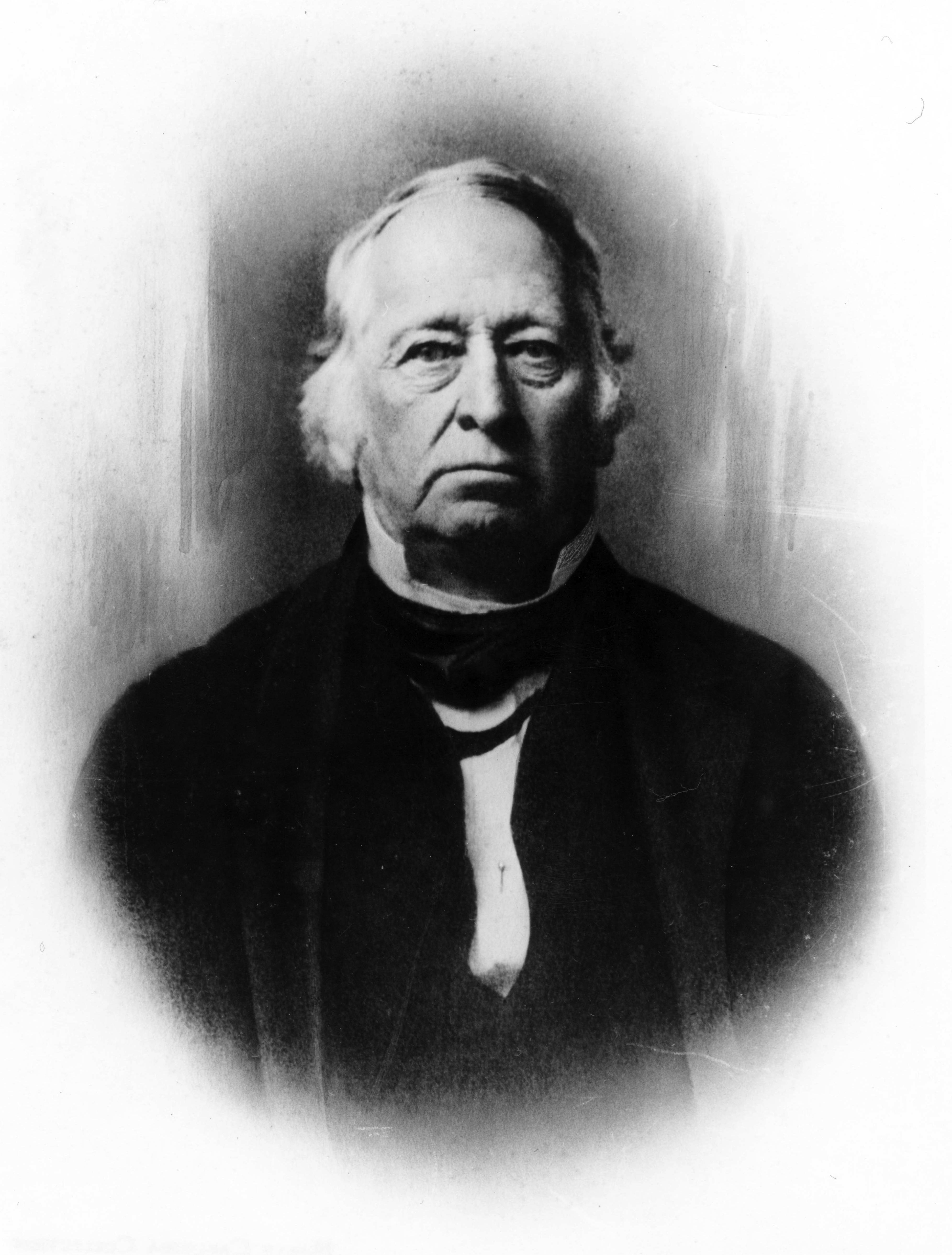 Romulus Mitchell Saunders (3 March 1791–21 April 1867)